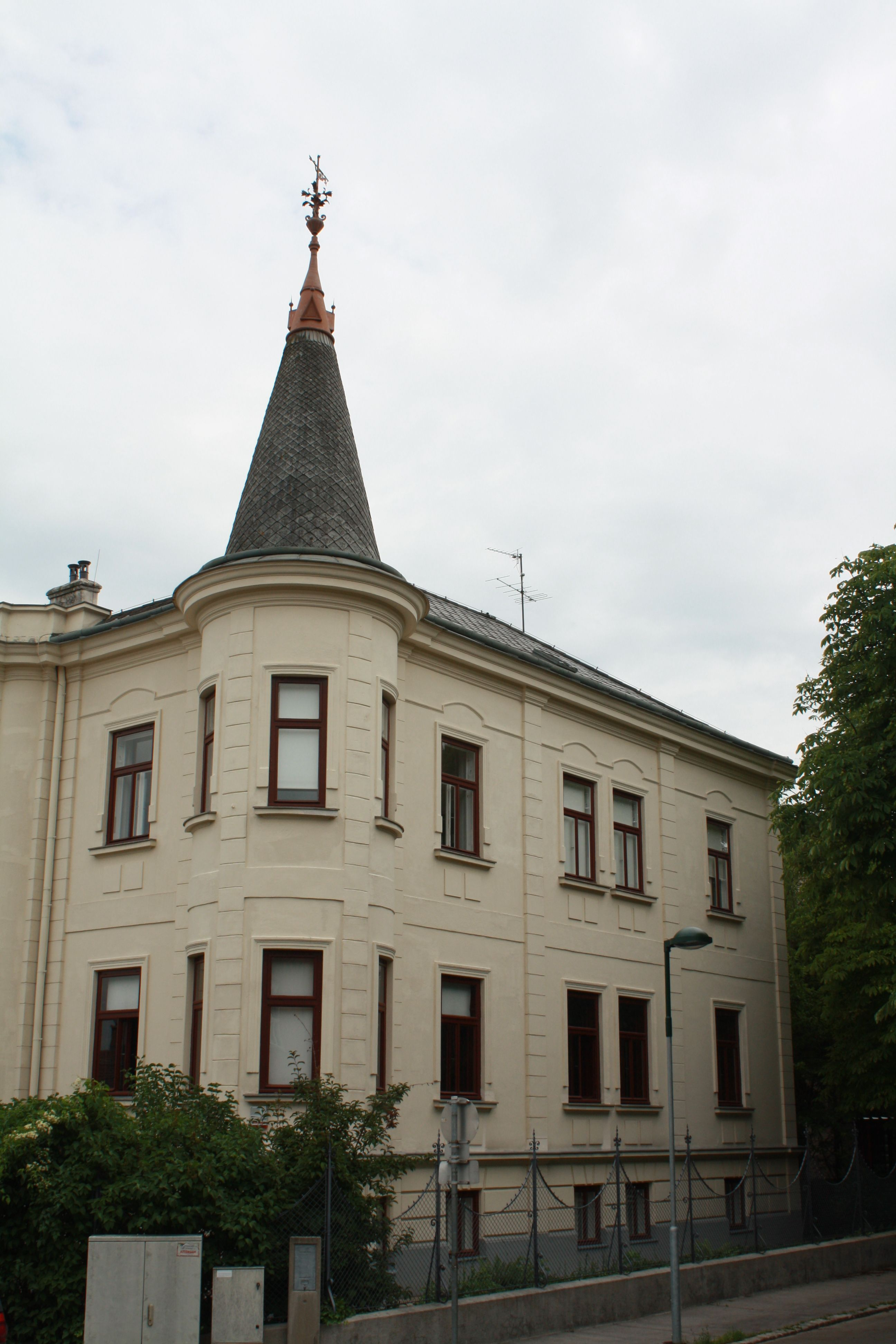 Arnold Schönberg-Villa in Mödling